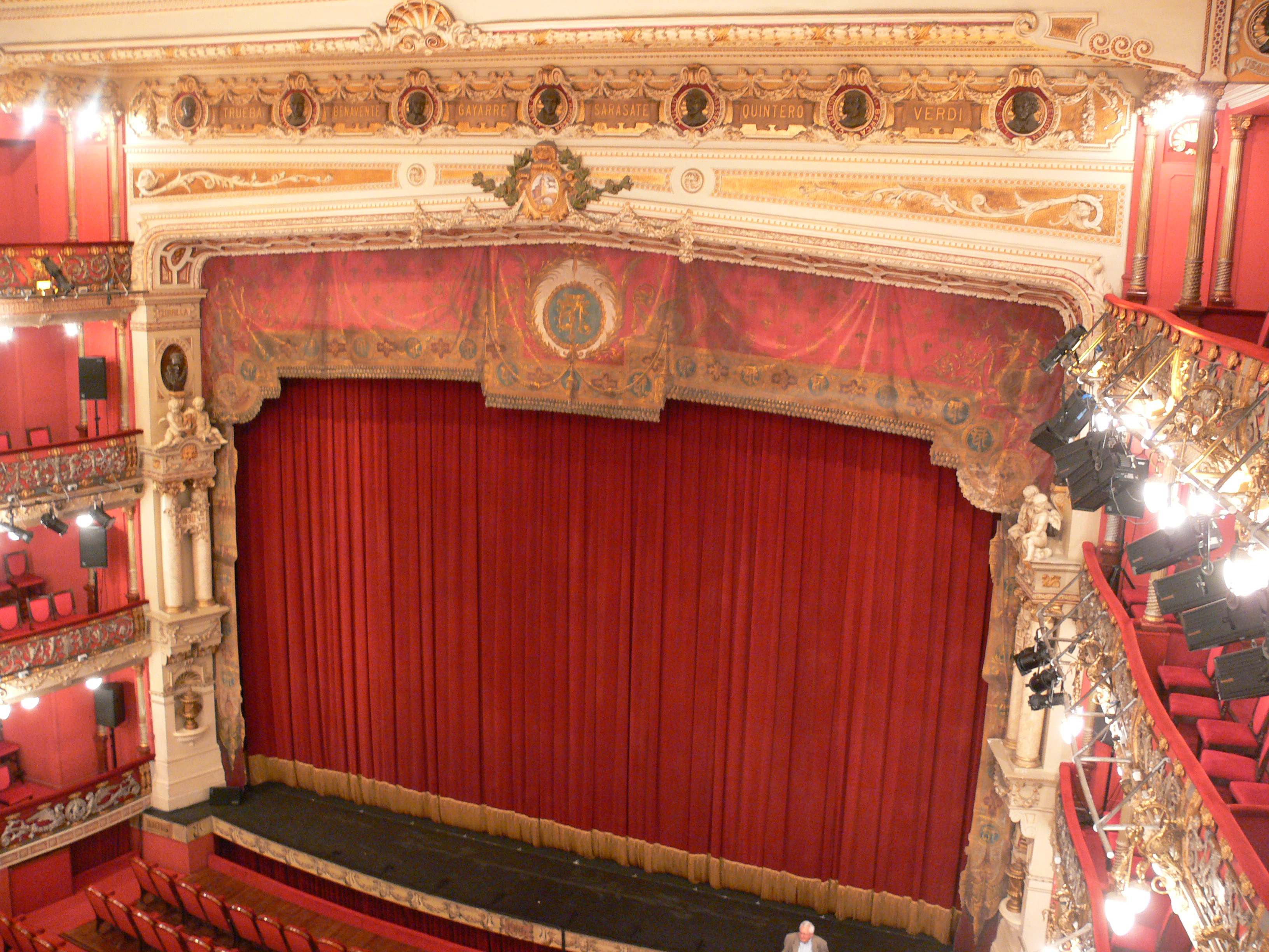 Teatro Arriaga, Bilbao.